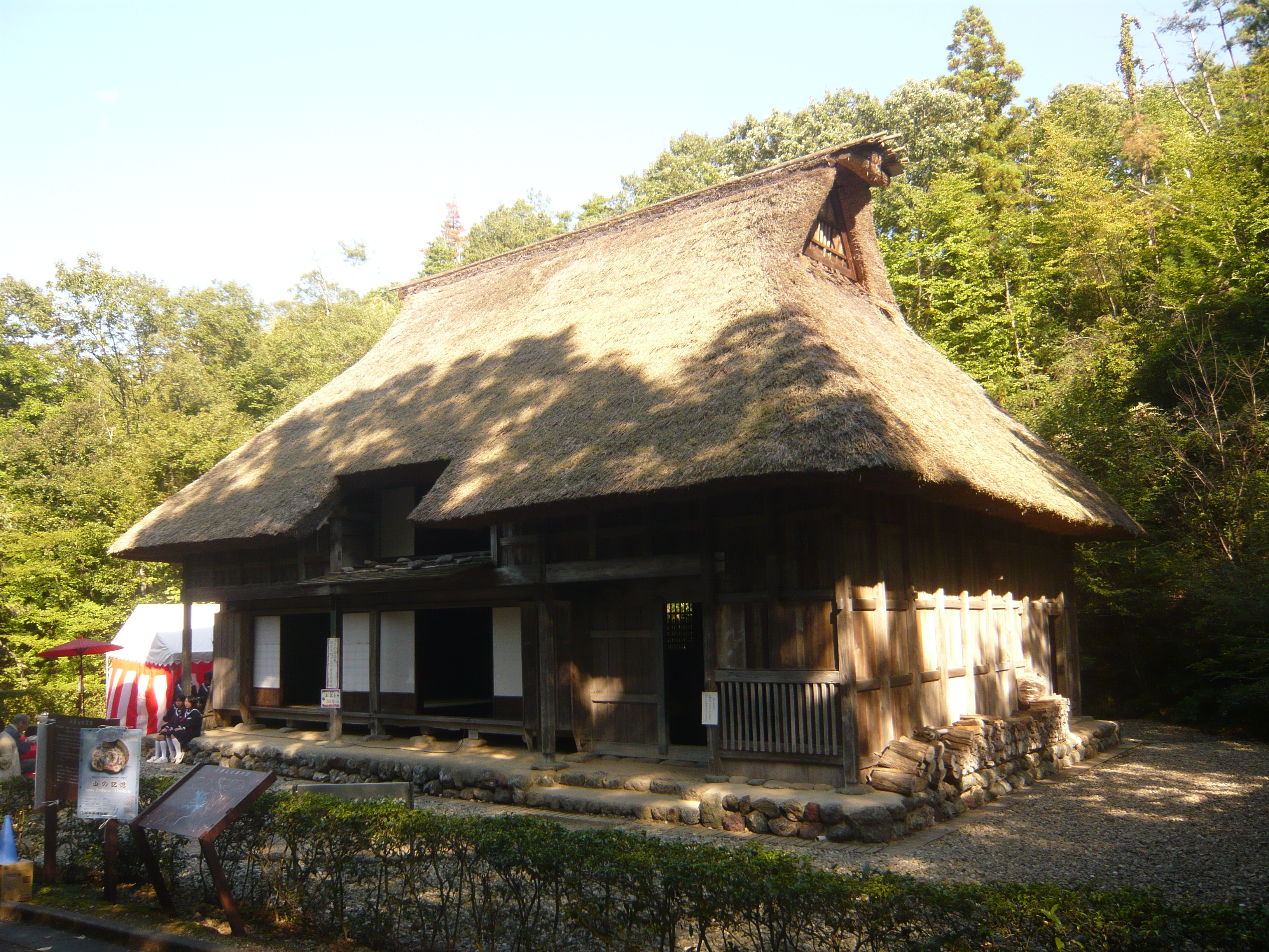 Gifu Pref Centennial Park 岐阜県百年公園 旧w:ja:徳山村 (岐阜県)の旧宮川家（岐阜県百年公園）,Seki,Gifu,Japan（岐阜県関市）で撮影。